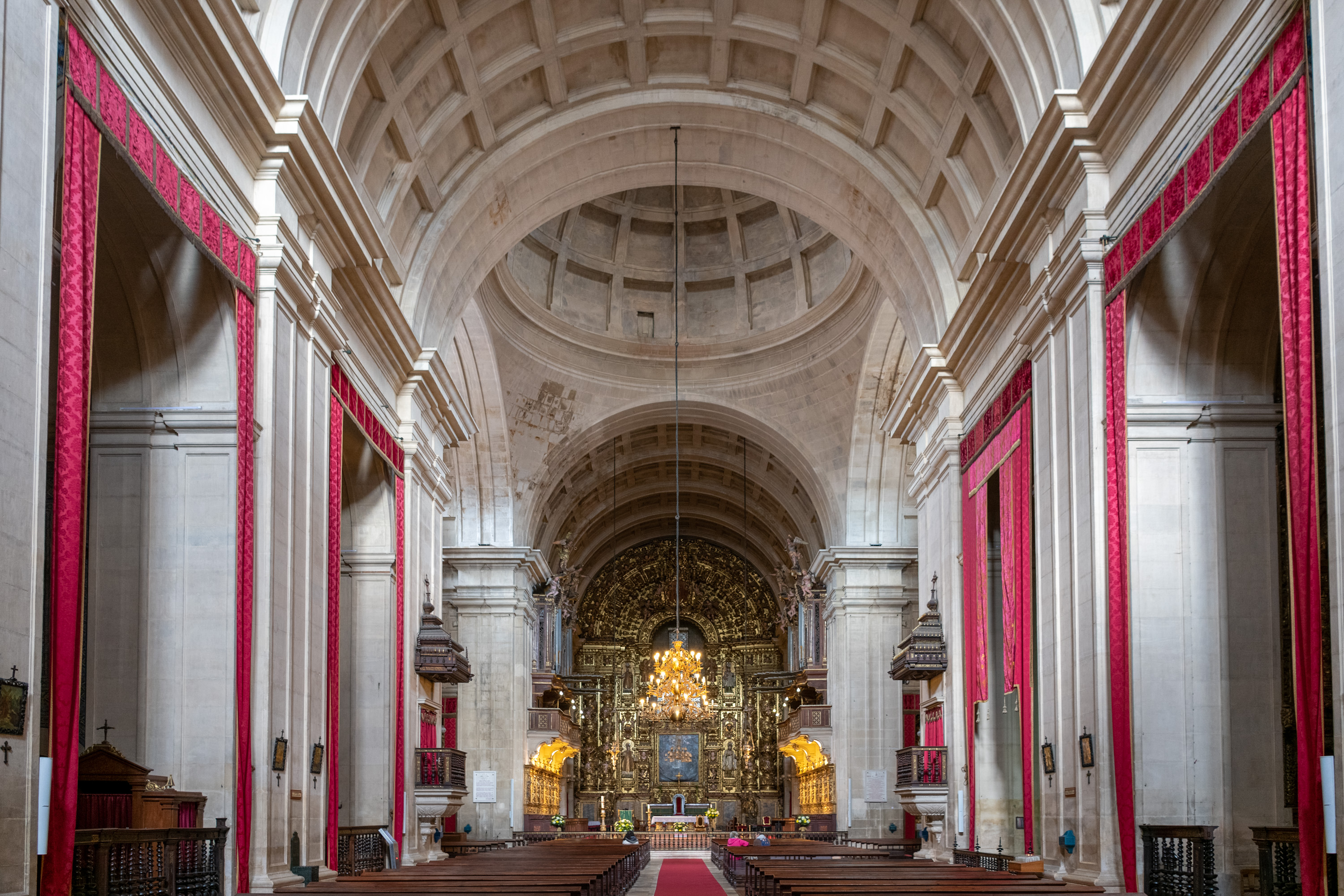 95165-Coimbra